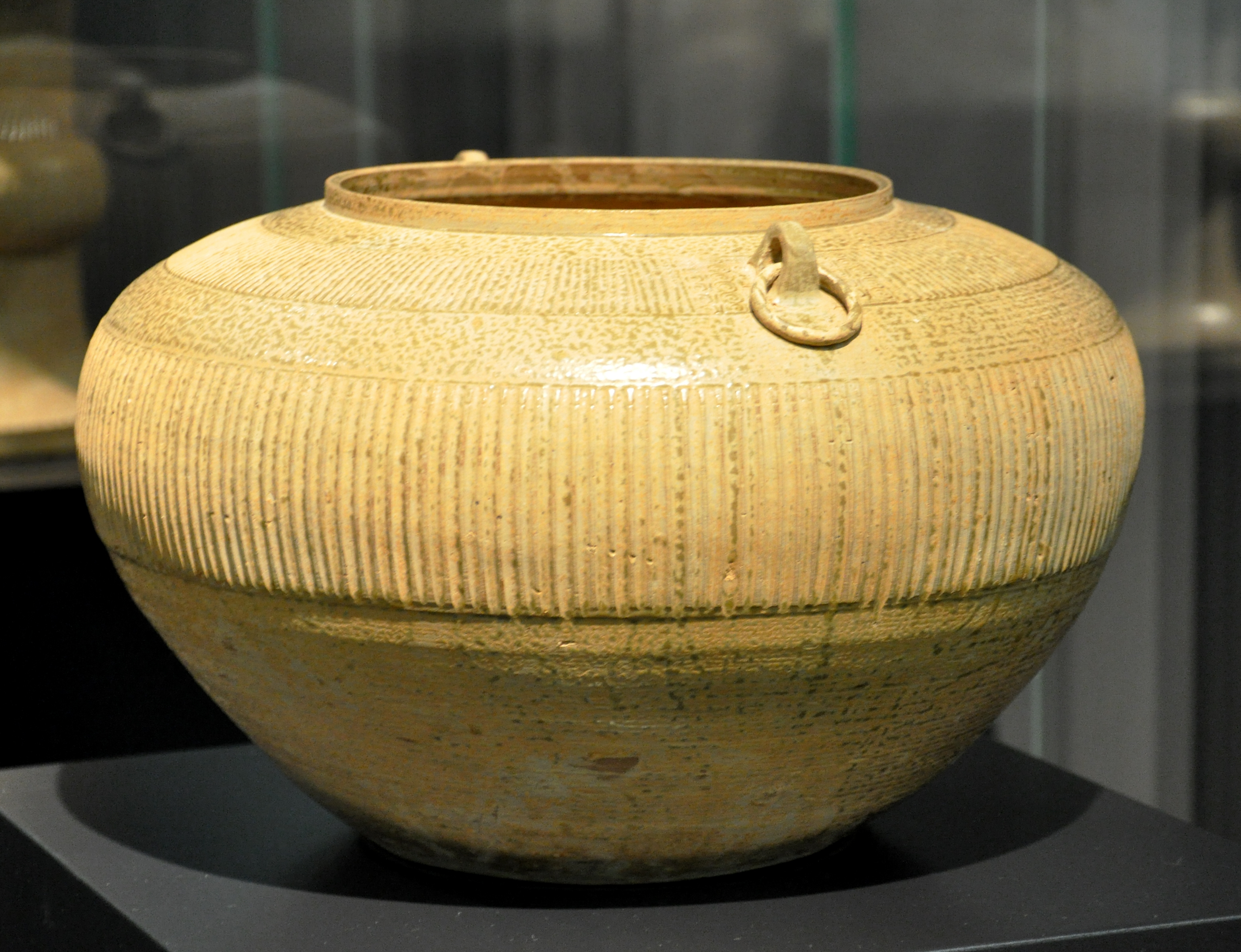 Topf, China, Provinz Zhejiang, östliche Zhou-Dynastie, Zhanguo-Periode, 4./3. Jahrhundert v. Chr., Protoporzellan mit Glasur Museum Rietberg, Zürich; Meiyintang Collection